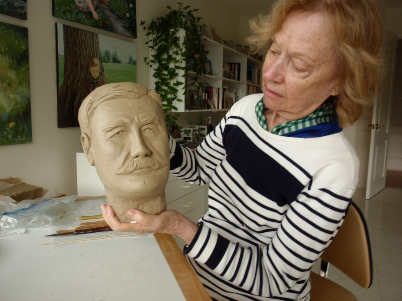 Yvonne Tremblay-Gagnon façonnant le buste d'Onésime Tremblay